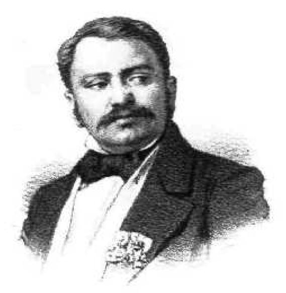 Griechischer Politiker, 19. Jahrhundert